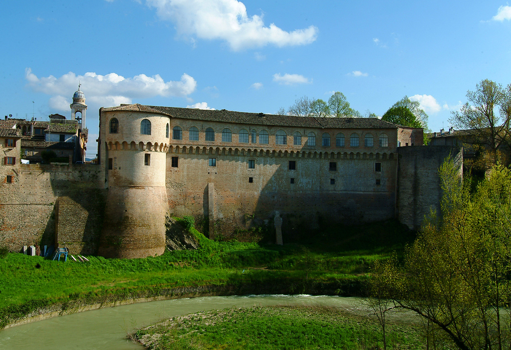 Le Palais Ducal de Urbania, Marches Italie